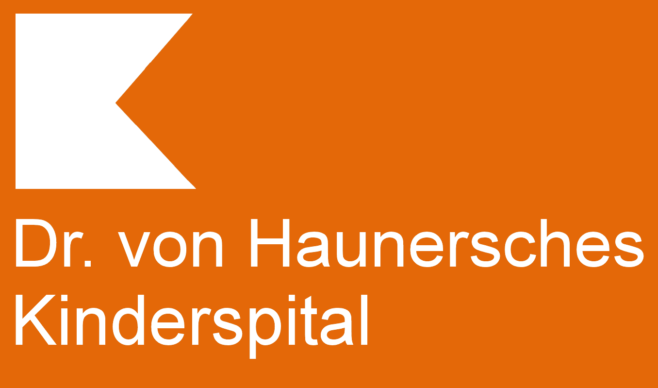 Logo des Dr. von Haunerschen Kinderspitals - extrahiert aus dem Foto des Hinweisschildes